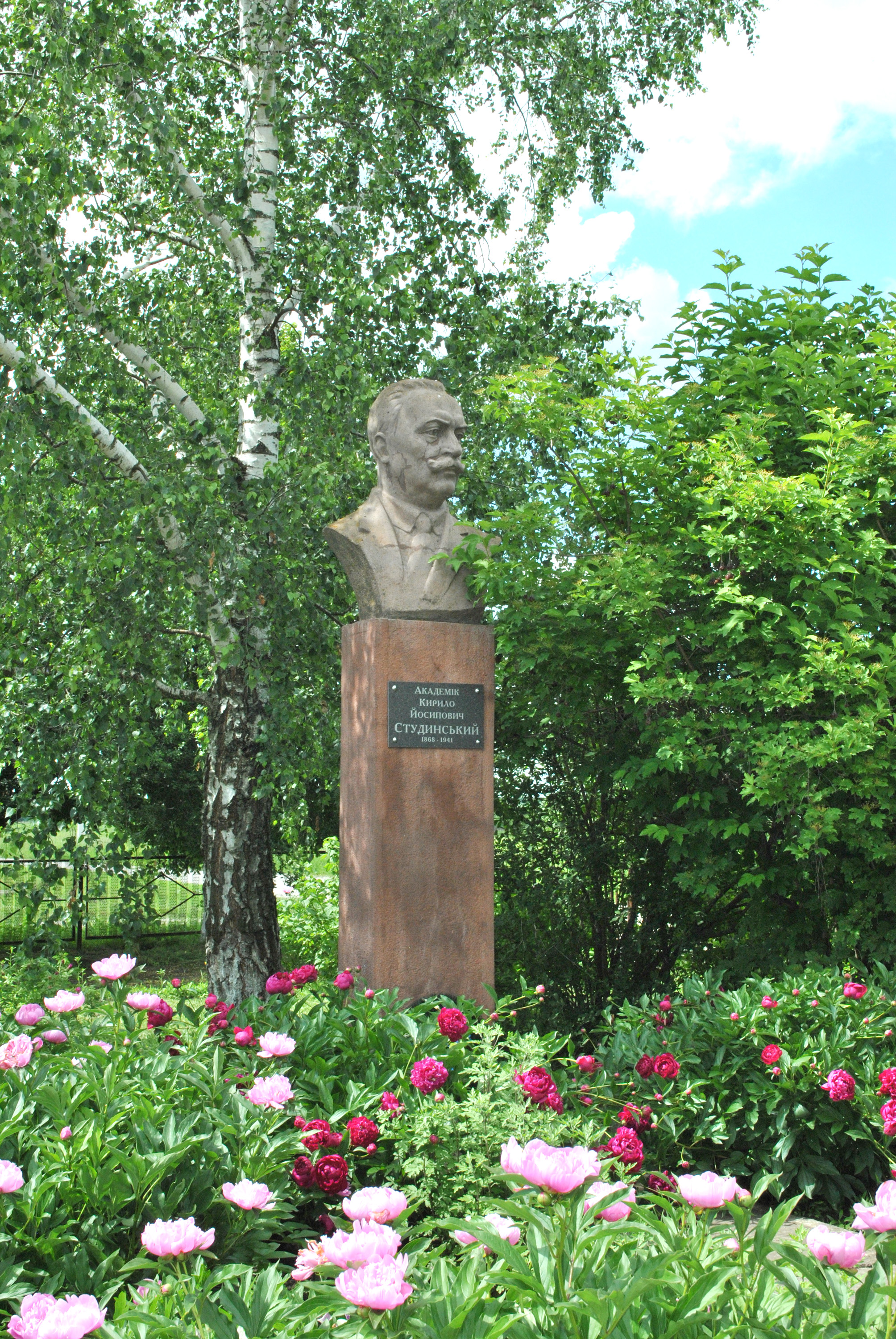 Пам'ятник академіку, мовознавцю, літературознавцю, фольклористу Кирилові Студинському в селі Кип’ячка (біля школи) Тернопільського району Тернопільської області.